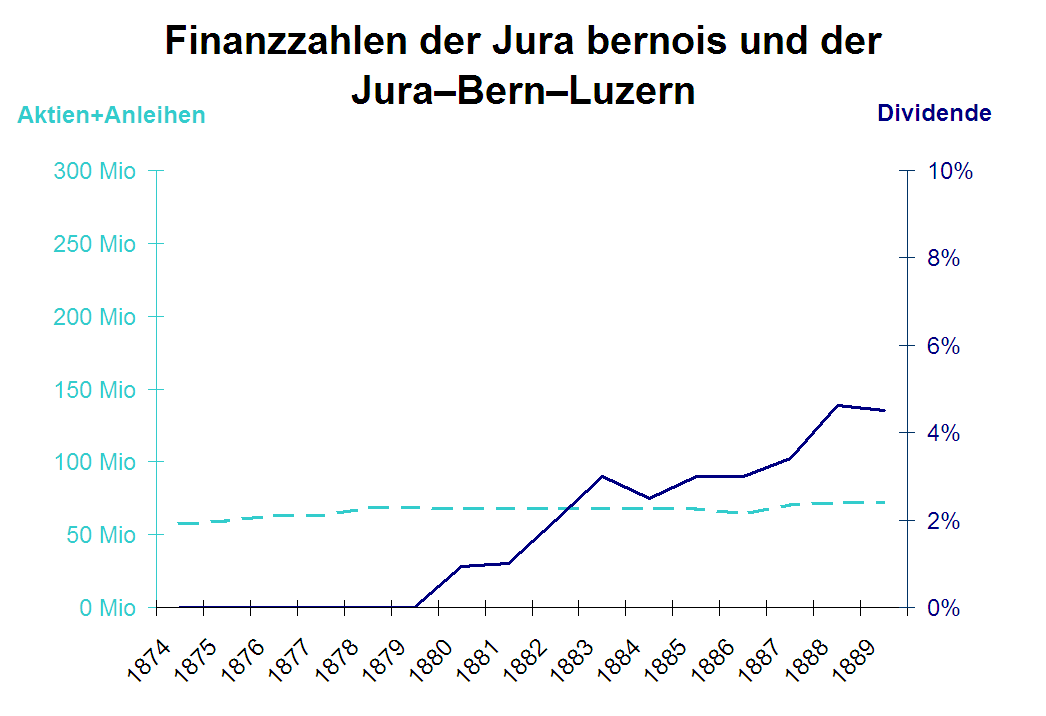 Aktienkapital und feste Anleihen sowie Dividende Aktien sind Anteile am Grundkapital des als Aktiengesellschaft konstituierten Bahnunternehmens. Sie sind hier im Nennwert angegeben, der jedoch in keiner Weise dem Kurswert entsprechen muss. Viele Bahnen haben im Laufe der Zeit ihr Aktienkapital erhöht, was gewöhnlich auf eine Expansion der Bahn hindeutet. Eine Verminderung des Aktienkapitals wurde bei finanziellen Schwierigkeiten vorgenommen, indem durch Herabsetzung des Nennwerts der Aktien Kapital für das Unternehmen freigesetzt wurde (sogenannter Kapitalschnitt). Feste Anleihen waren neben Aktien die wichtigste Form der Geldbeschaffung für die Bahnen. Das vom Unternehmen aufgenommene Kapital wird über eine bestimmte Laufzeit zu einem bestimmten Zinssatz verzinst. Die Zinslast für Anleihen war ein gewichtiger Ausgabeposten insbesondere der grossen Bahnen. Wenn wegen zu geringen Erträgen die Zinsen nicht mehr bezahlt werden können, droht der Konkurs. Die Dividendenauszahlungen für die Aktionäre sind hier im Verhältnis zum Nennwert der Aktien angegeben.